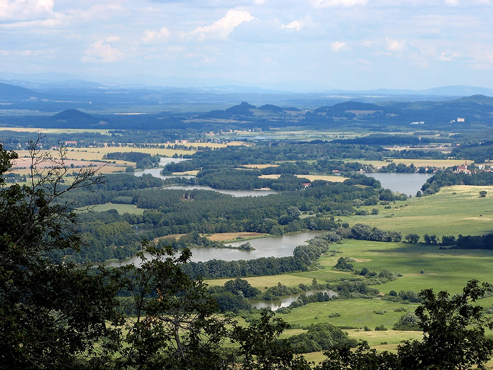 Výlet na Vlhošť a Ronov 24. 6. 2007